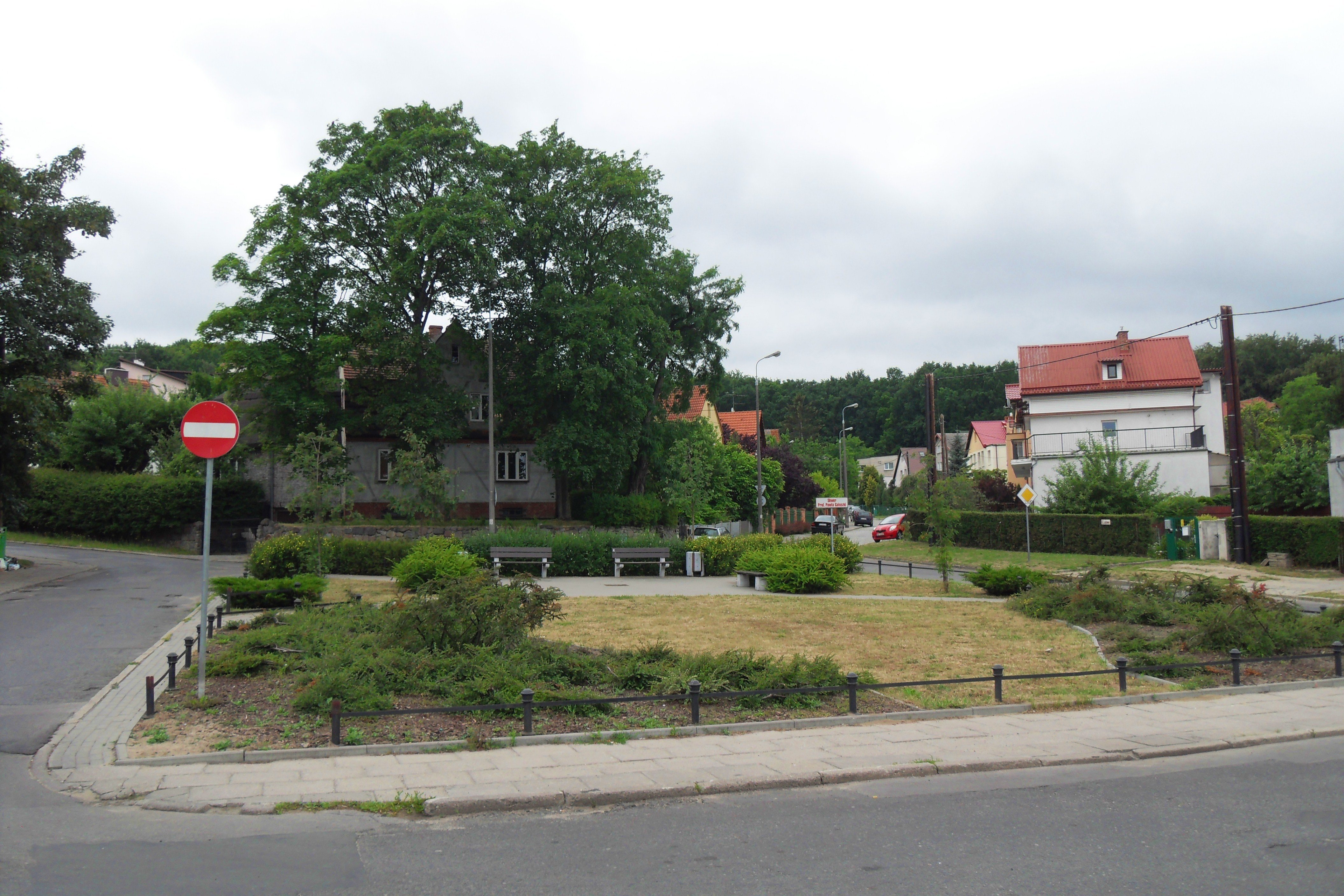 Gdańsk Strzyża, skwer prof. Pawła Gałuszki.